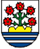 Blazon of Rorschacherberg, Canton of St. Gallen - Blazono de Rorschacherberg, Kantono de Sankt-Galo